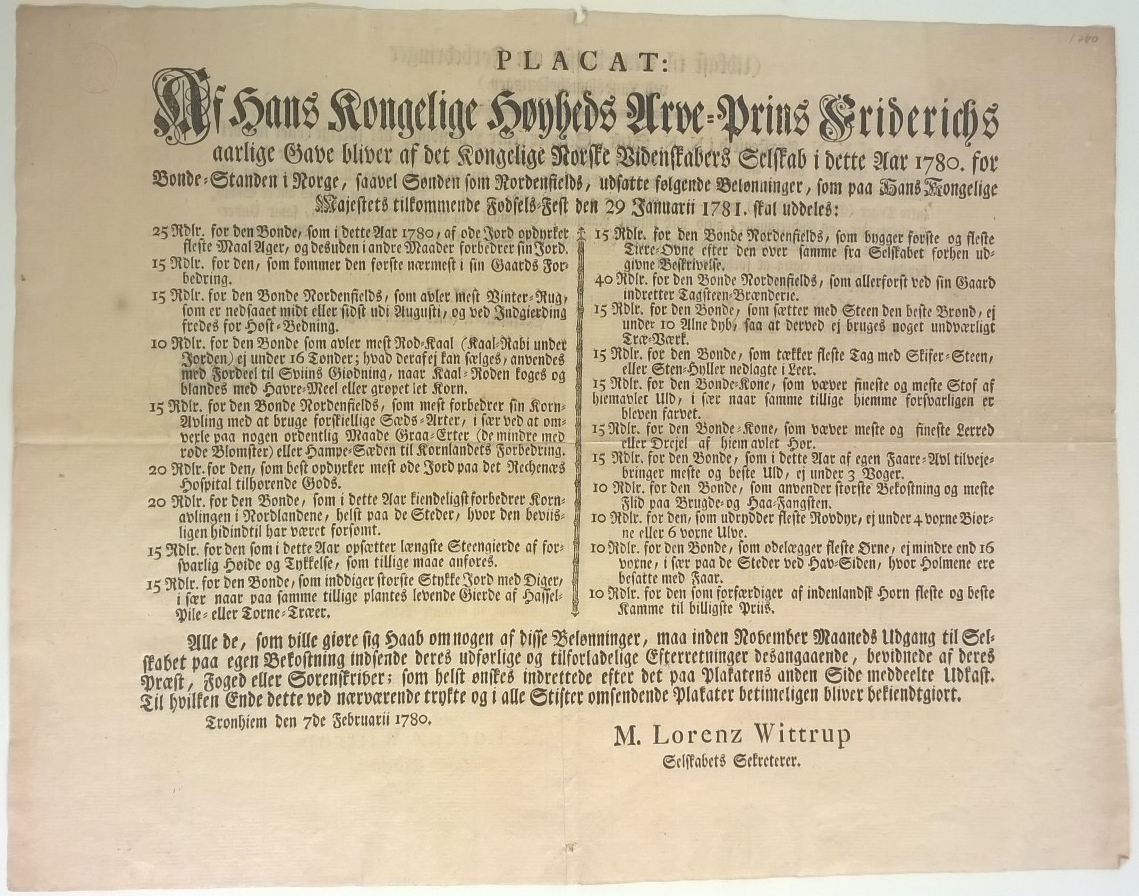 Plakat med utlysning av premier fra Det Kongelige Norske Videnskabers Selskab, i egenskap av Landhusholdningsselskab for 1780. Original i NTNU Universitetsbiblioteket, Arkiv: A-0277 DKNVS.